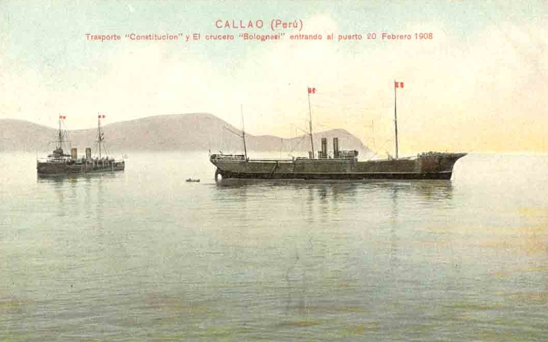 BAP Constitución entrando al Callao en 1908